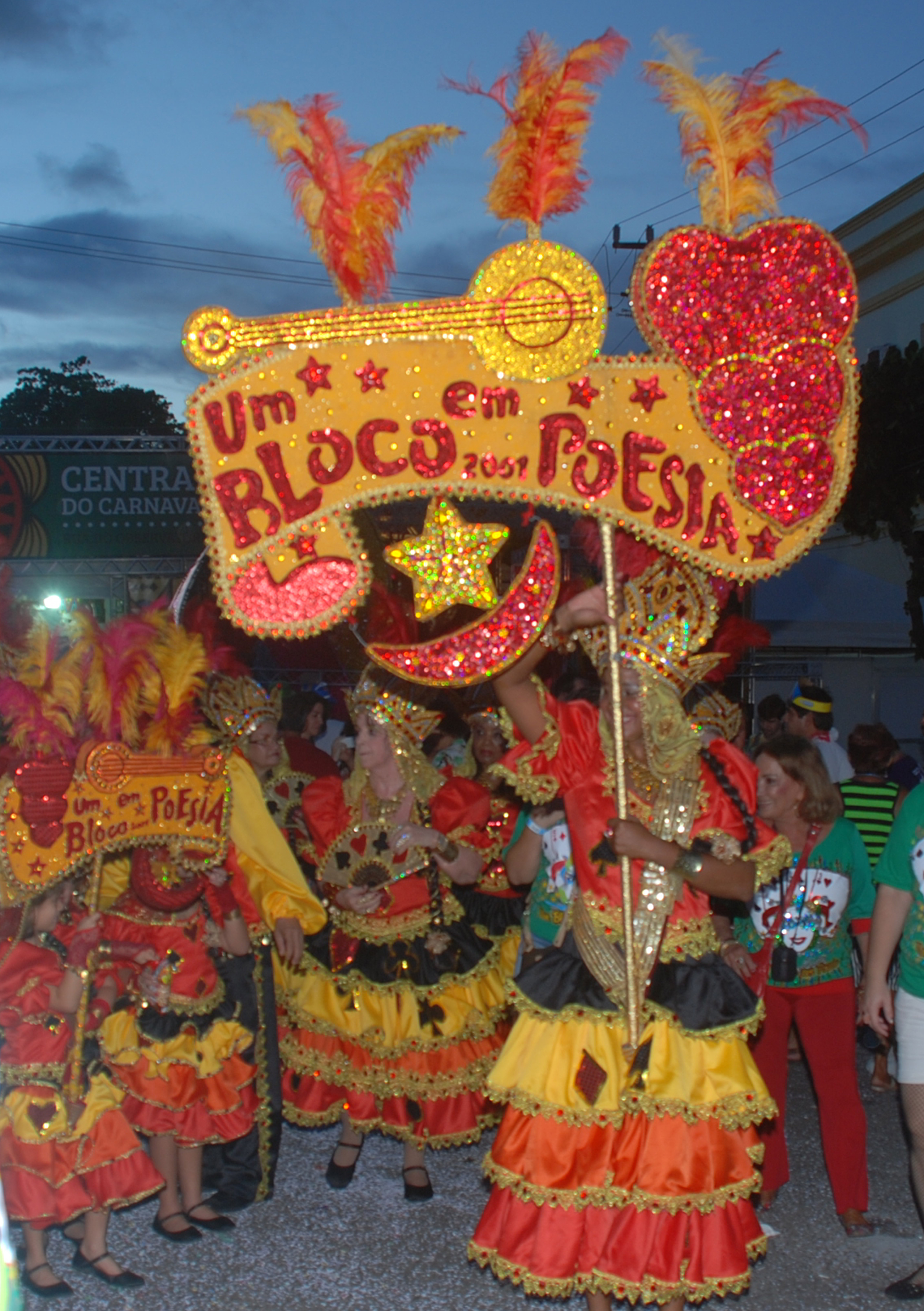 O flabelo é um abre-alas dos blocos líricos do carnaval pernambucano. Cada flabelo tem seu formato próprio, geralmente de material rígido.